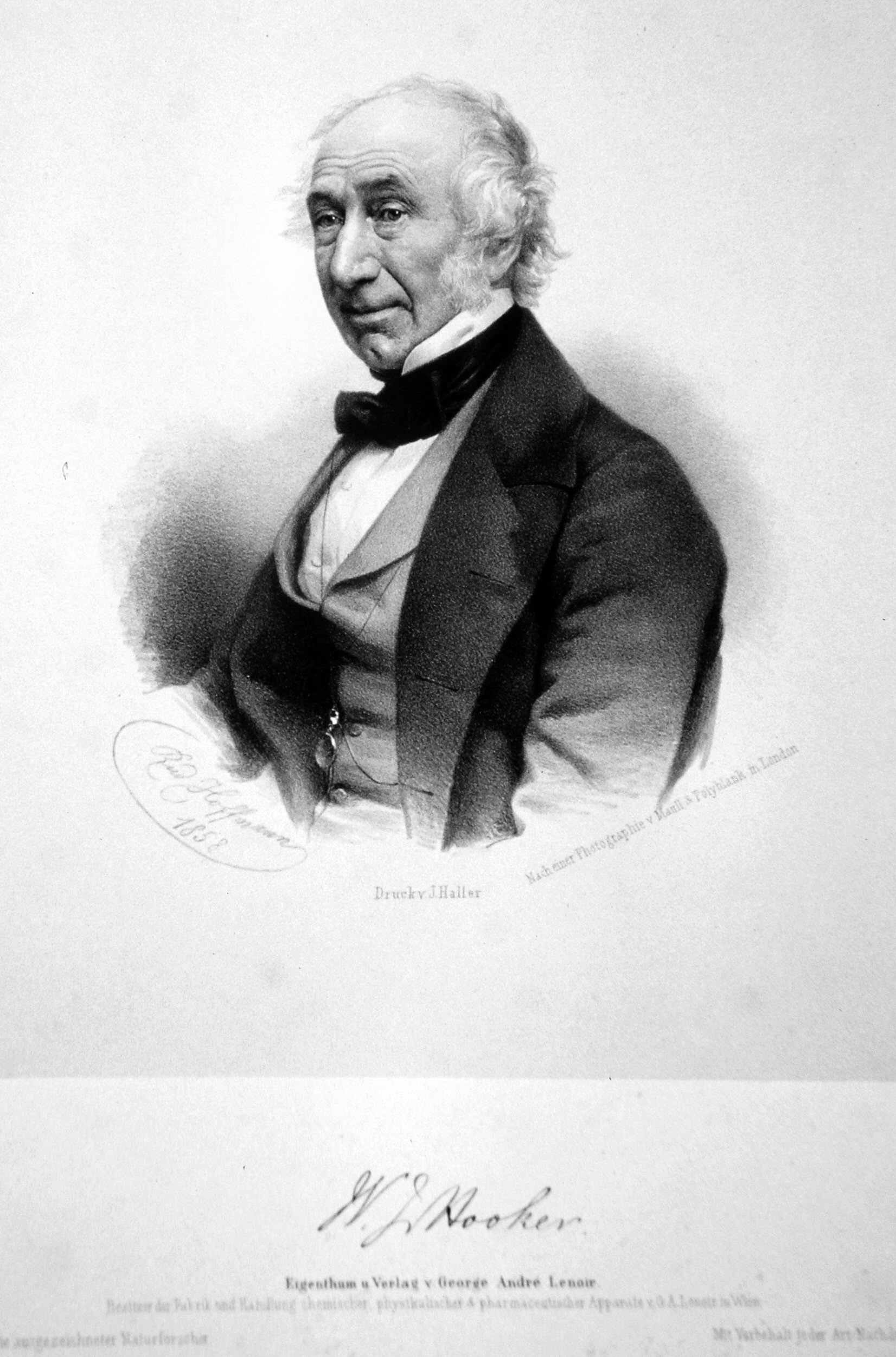 William Jackson Hooker (1785-1865), englischer Botaniker. Lithographie von Rudolf Hoffmann, 1858; nach einem Photo von Maull & Polyblank.